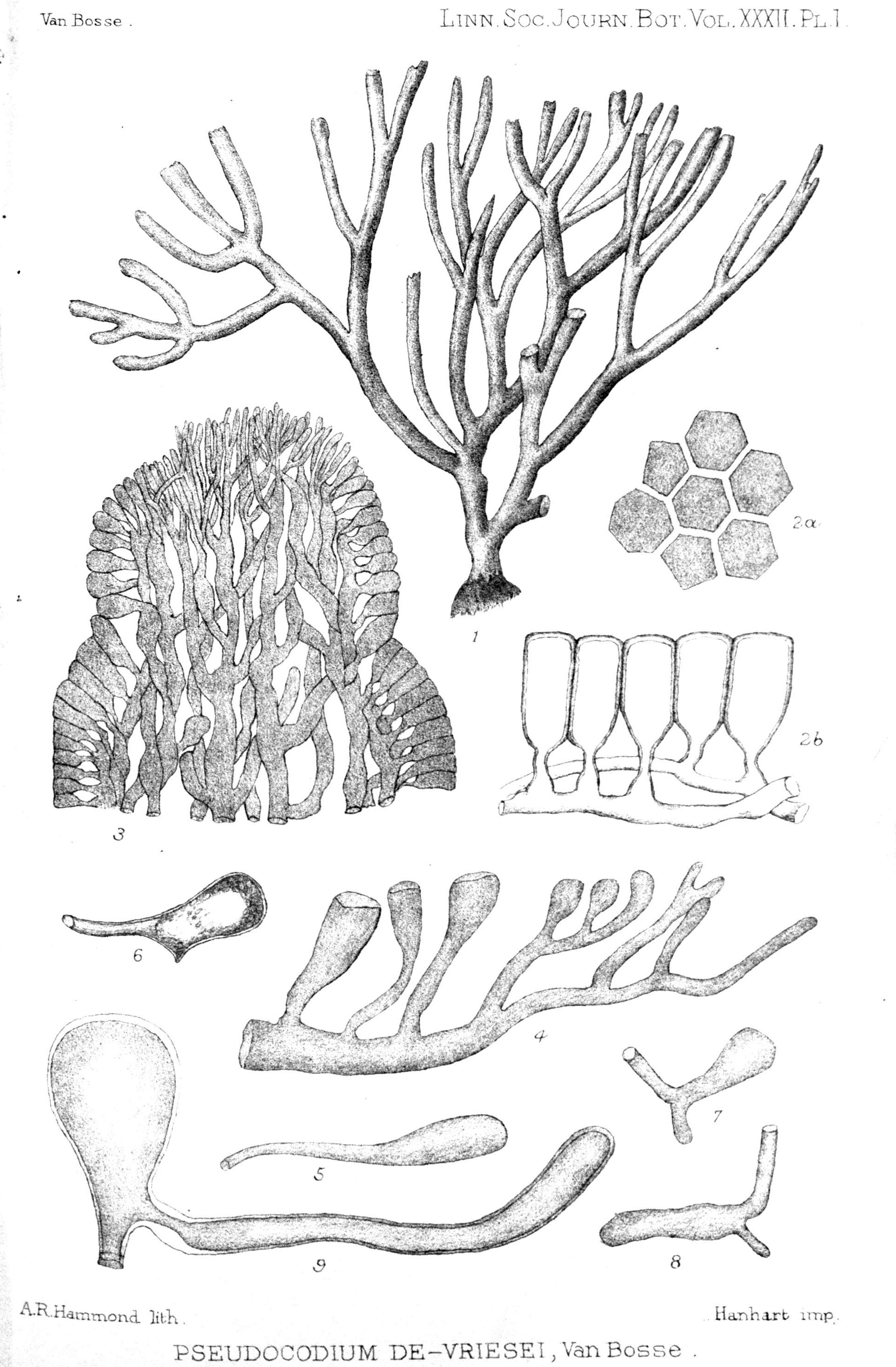 Pseudocodium devriesii Weber Bosse